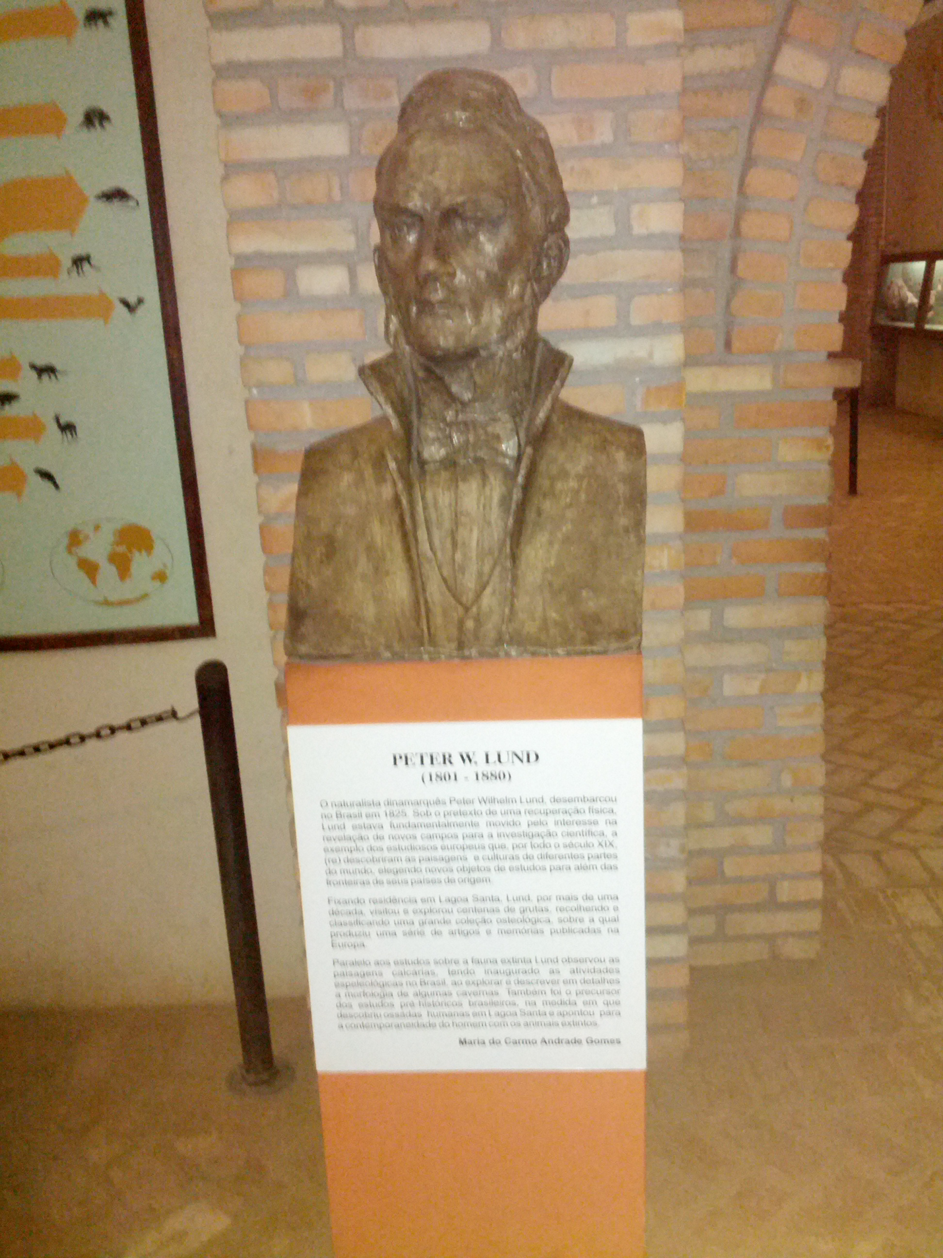 Estátua de Peter Lund no Jardim Botânico da UFMG.